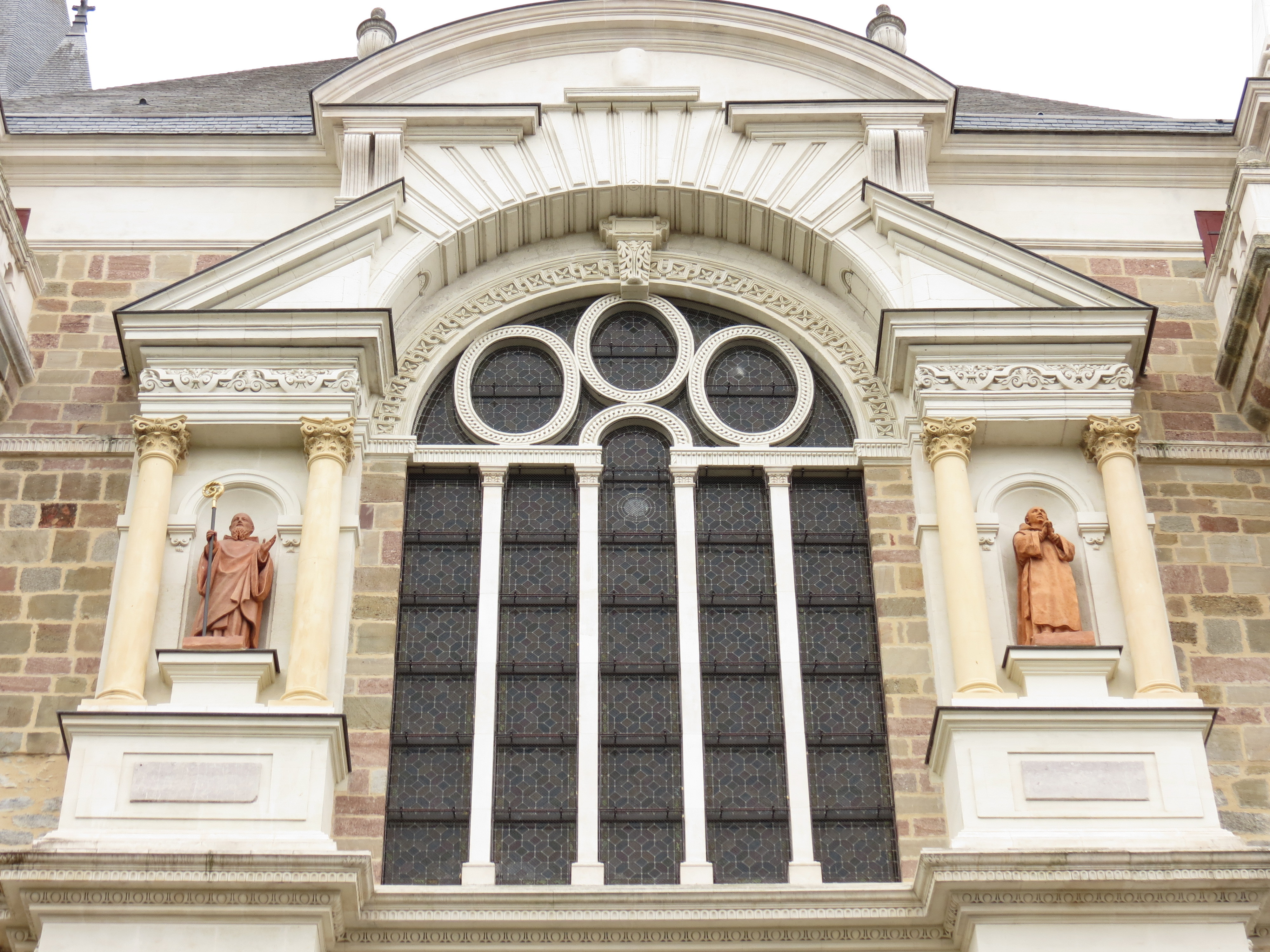 Cathédrale de la Sainte-Trinité de Laval, Laval, Mayenne, Pays de la Loire.